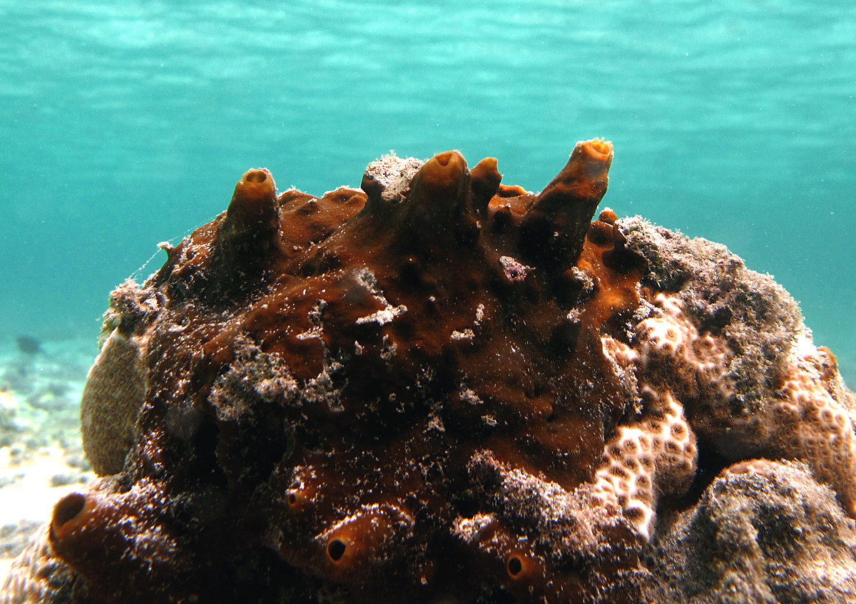 Une éponge Spheciospongia vagabunda à la Réunion.